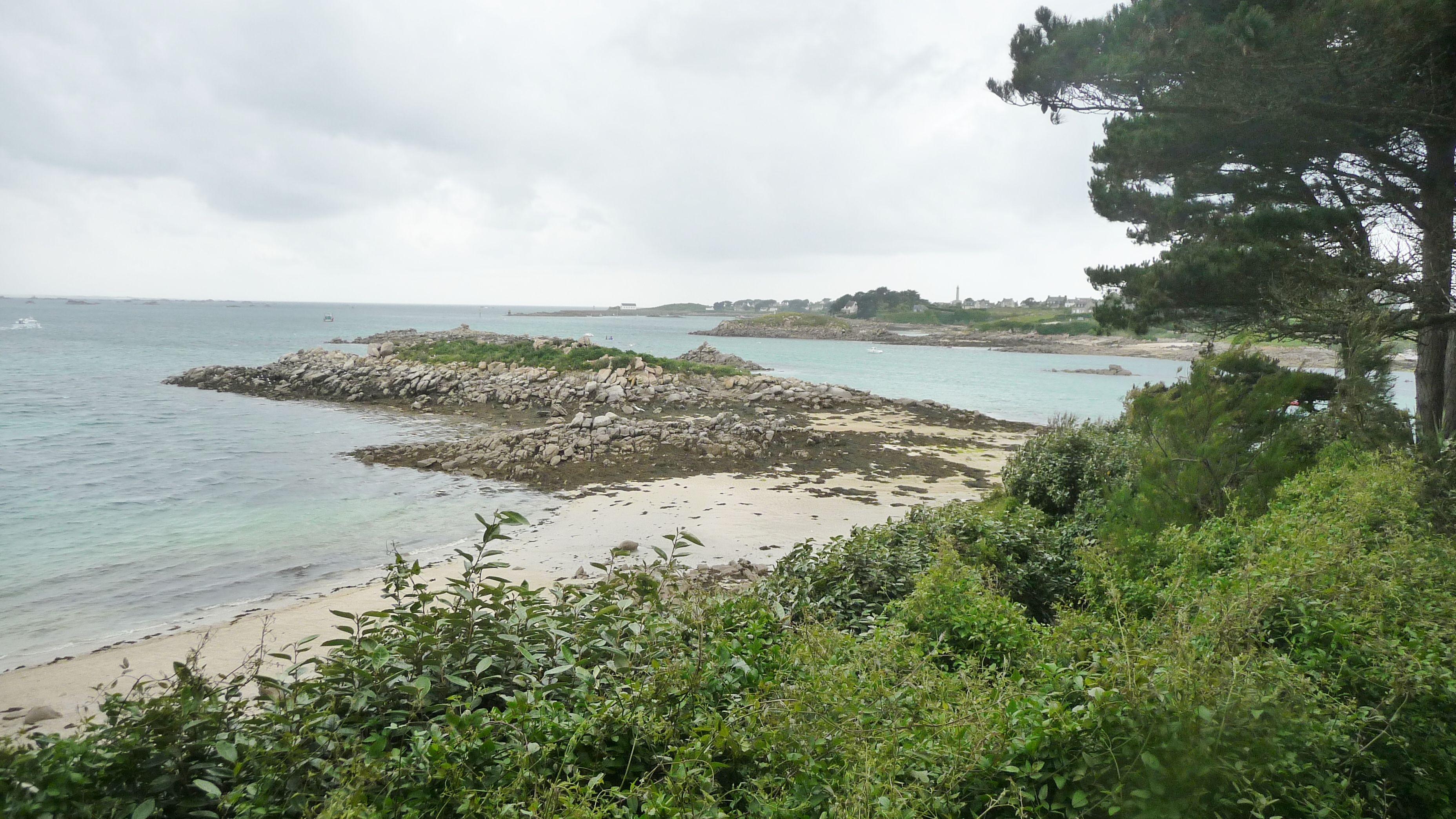 Île de Batz : paysage de l'île vu du jardin Georges Delaselle